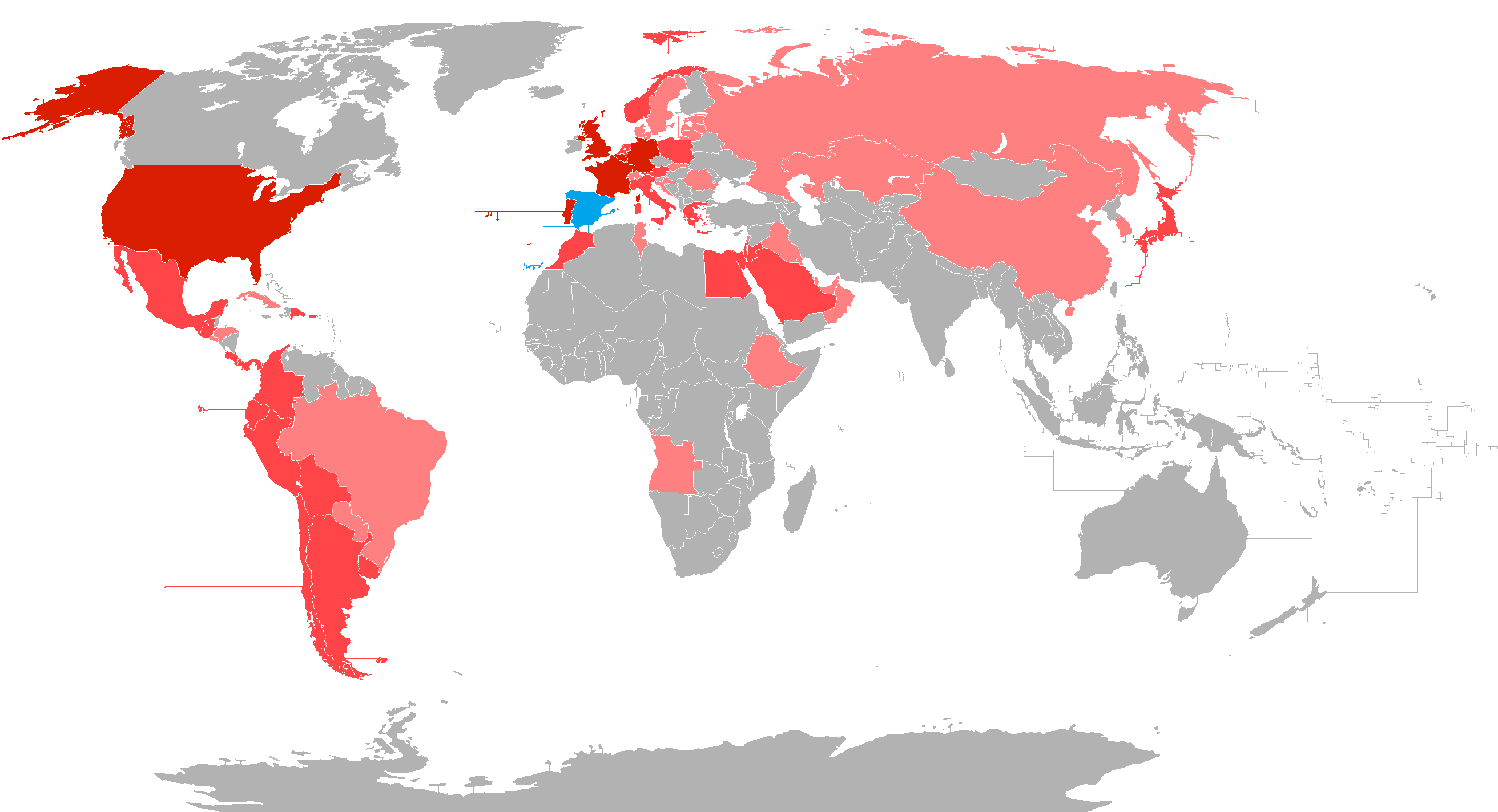 Aparecen reflejados los países visitados por el rey Felipe VI de España durante su reinado